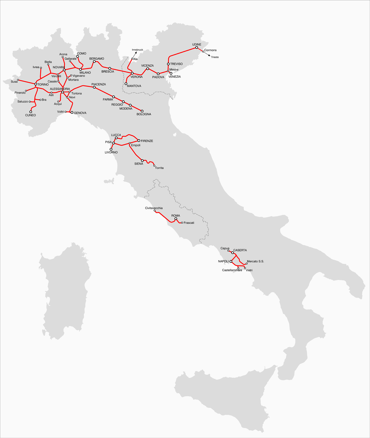 La rete ferroviaria degli Stati italiani al momento della proclamazione del Regno d'Italia (17 marzo 1861). Dati tratti dal Prospetto cronologico dei tratti di ferrovia aperti all'esercizio dal 1839 al 31 dicembre 1926.